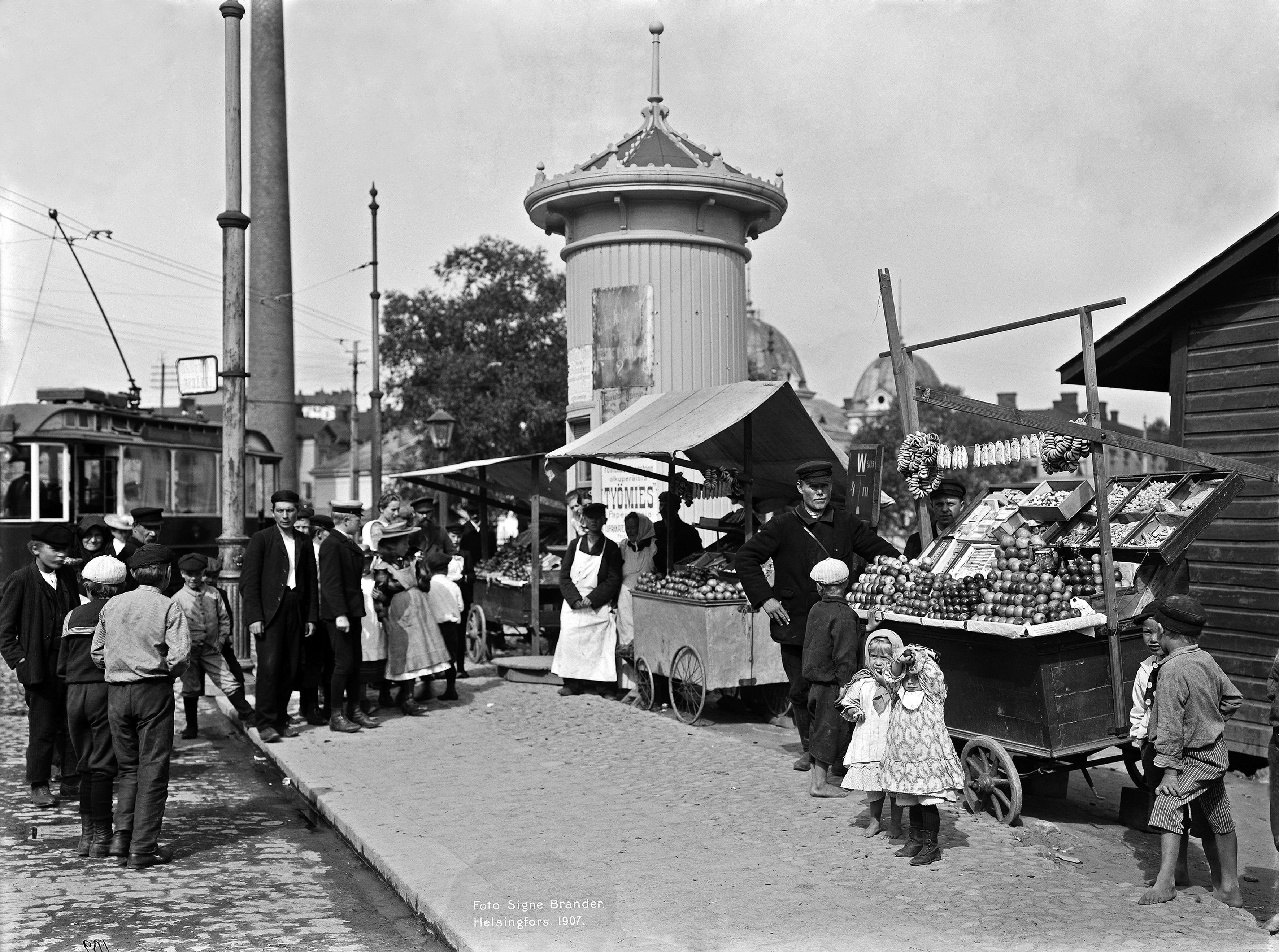 Venäläisiä hedelmäkauppiaita Hakaniementorilla 1907